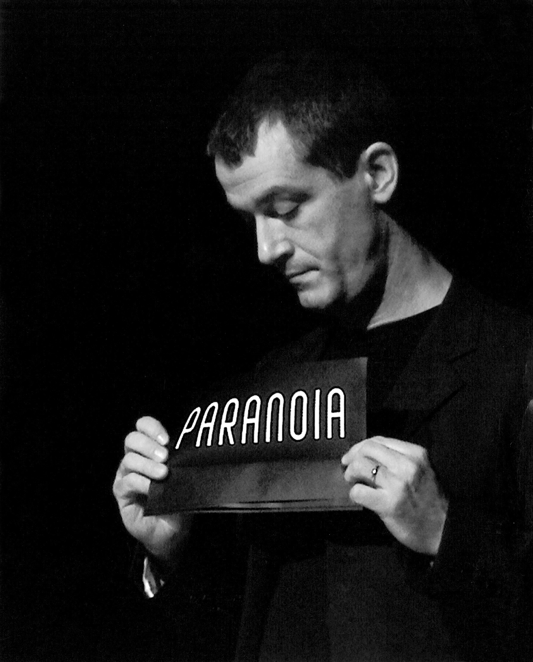 Portrait de Pierre Fourny